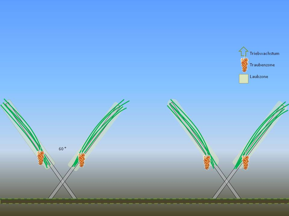 Tatura Spaliererziehung